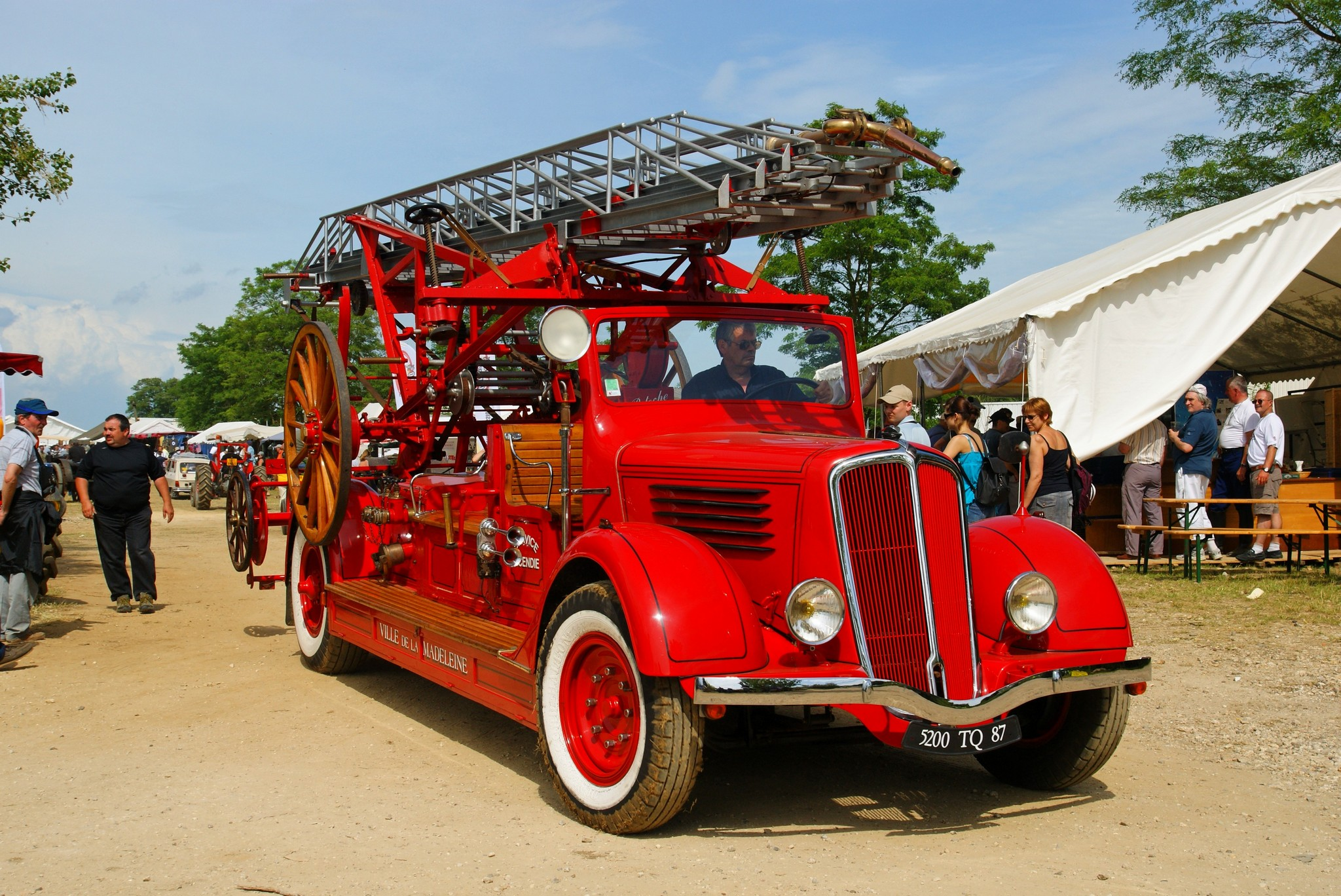 Camion de pompier roulant lors de "La locomotion en fêtes" à La Ferté Alais (2009)